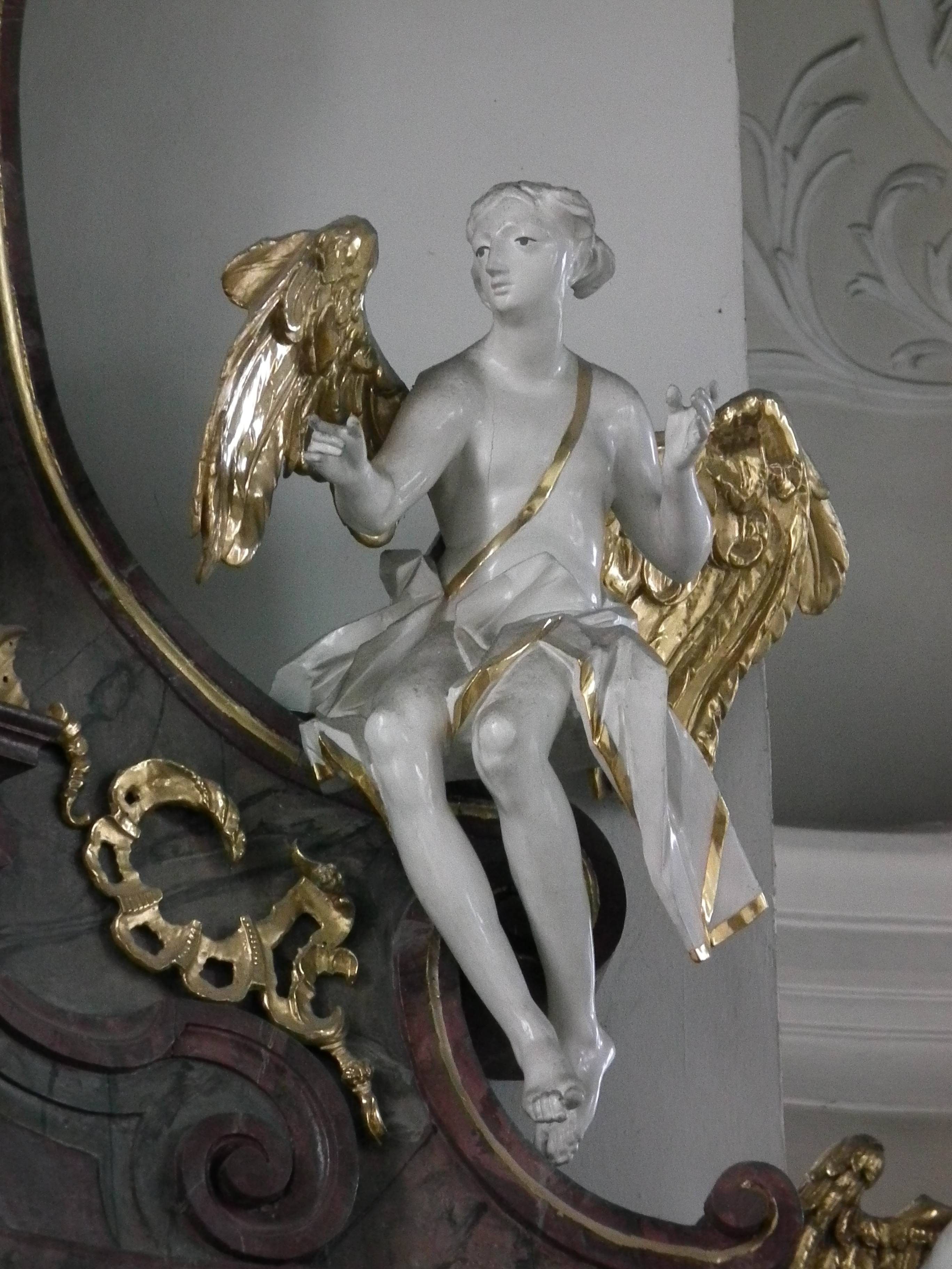 Skulptur eines erwachsenen Engels auf einem Seitenaltar in der katholischen Kirche St. Laurentius in Wiesloch (Baden-Württemberg, Deutschland)